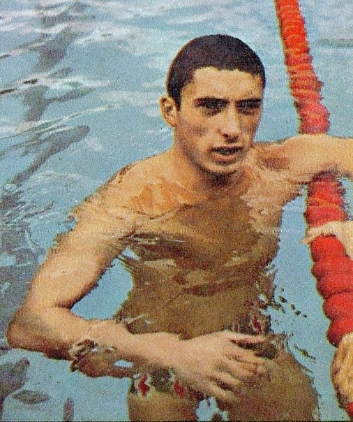 MUNCHEN/MONACO '72-PANINI-Figurina n.190- PANKIN - URSS -NUOTO-Rec